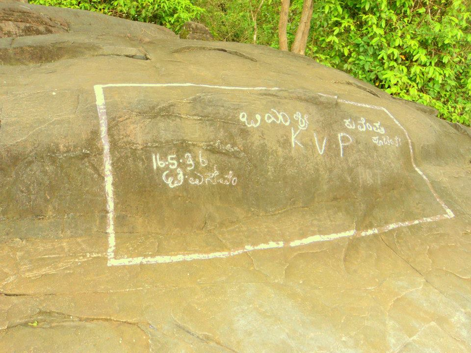 ಕನ್ನಡ: ಪೊ ಚಿಂ ತೇ